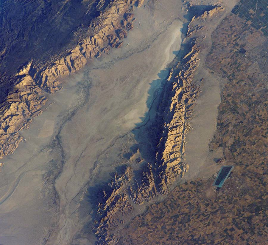 Se muestra al centro de la imagen, la Laguna Salada y la Sierra Cucapá . Aparecen giradas en sentido de las manecillas del reloj, unos 60 grados, desde la perspectiva de la imagen del mundo alineada verticalmente con sus meridianos y orientando el polo norte hacia arriba.